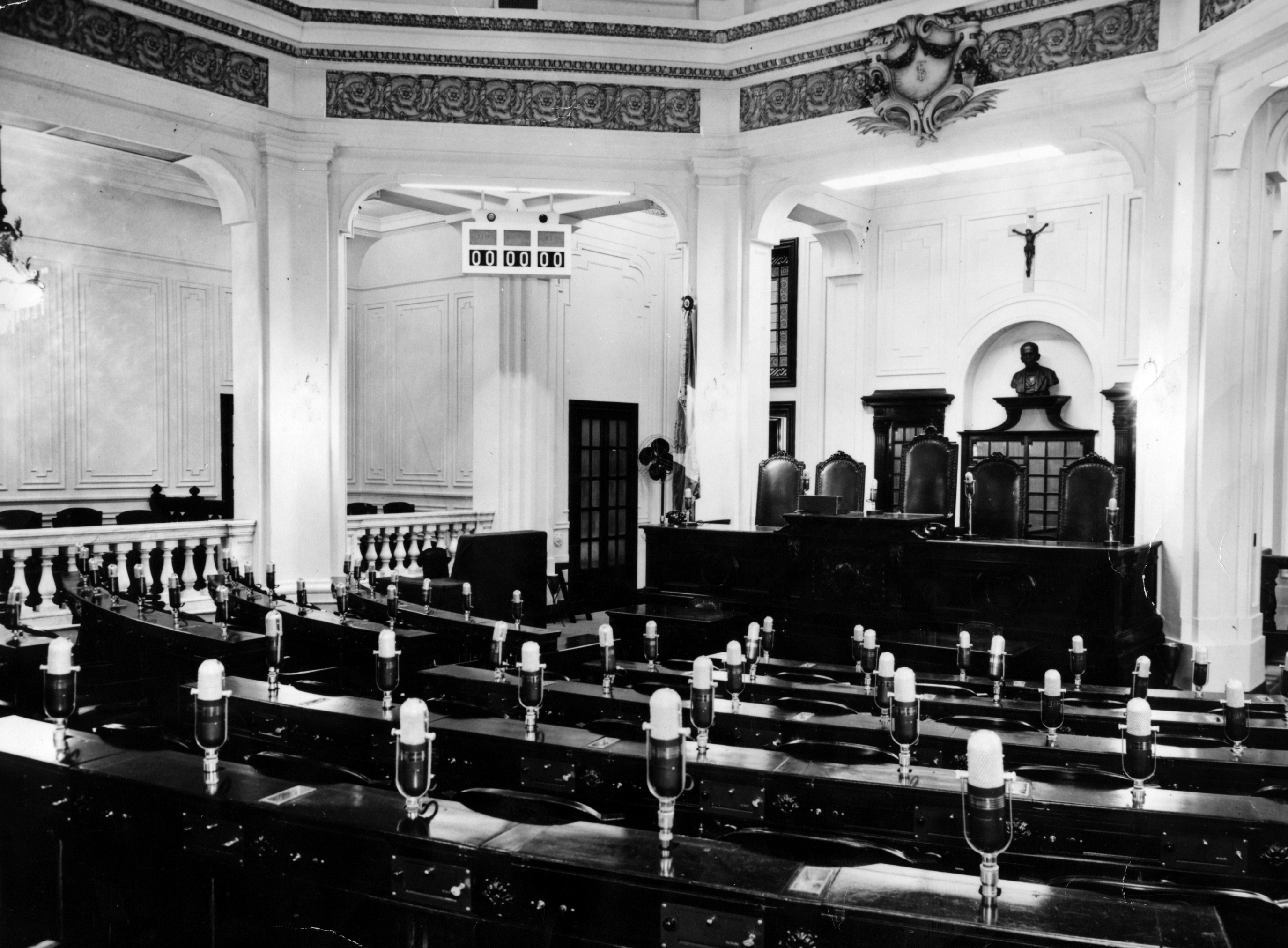 Interior do Palácio Monroe. O Palácio Monroe foi construído pelo engenheiro Francisco Marcelino de Souza Aguiar em 1904 e demolido em 1976. O Senado funcionou no Palácio entre 1925 e 1960. O Palácio Monroe localizava-se na Cinelândia, no centro do Rio de Janeiro. Durante as comemorações do primeiro centenário da independência, o Senado Federal passou a utilizar o Monroe como sua sede. Com a mudança do Distrito Federal para Brasília, em 1960, o Monroe passou a exercer a função de escritório de representação do Senado no Rio de Janeiro. Foto digitalizada.